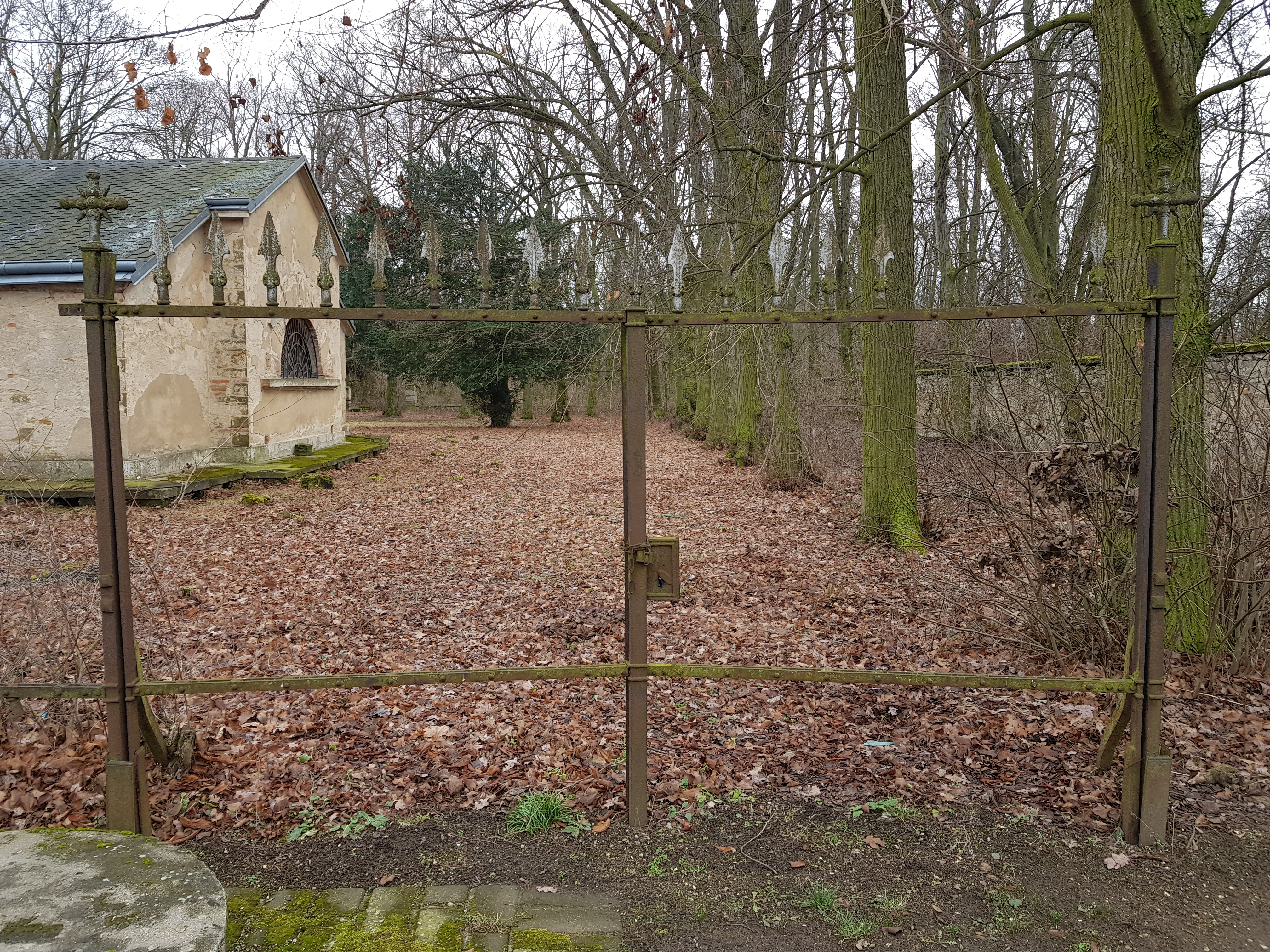 Hrobka Kinských v Budenicích, zbytky kovového ohrazení areálu